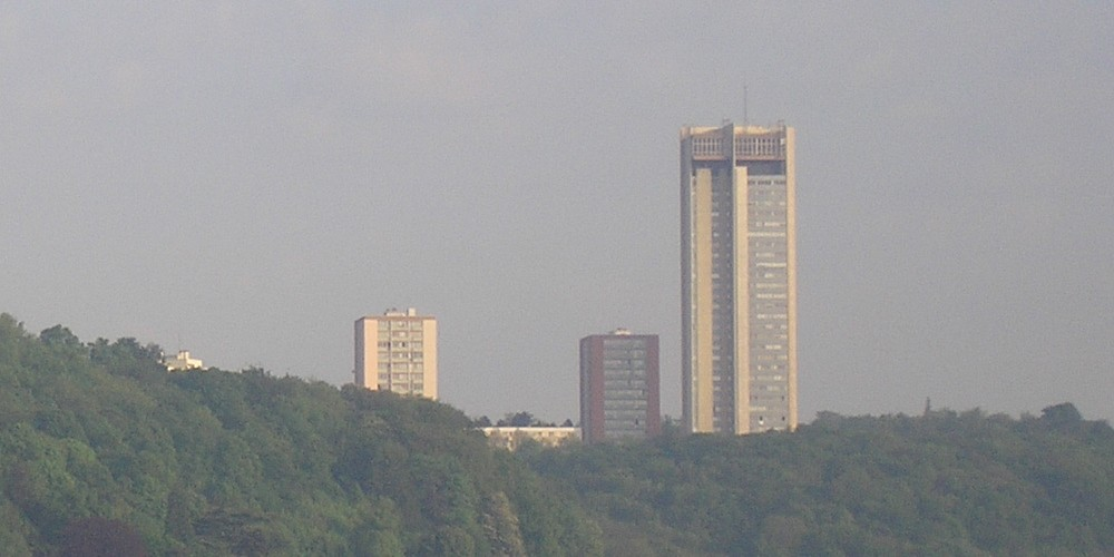 Tour panoramique, les Aulnes à Maxéville (France)